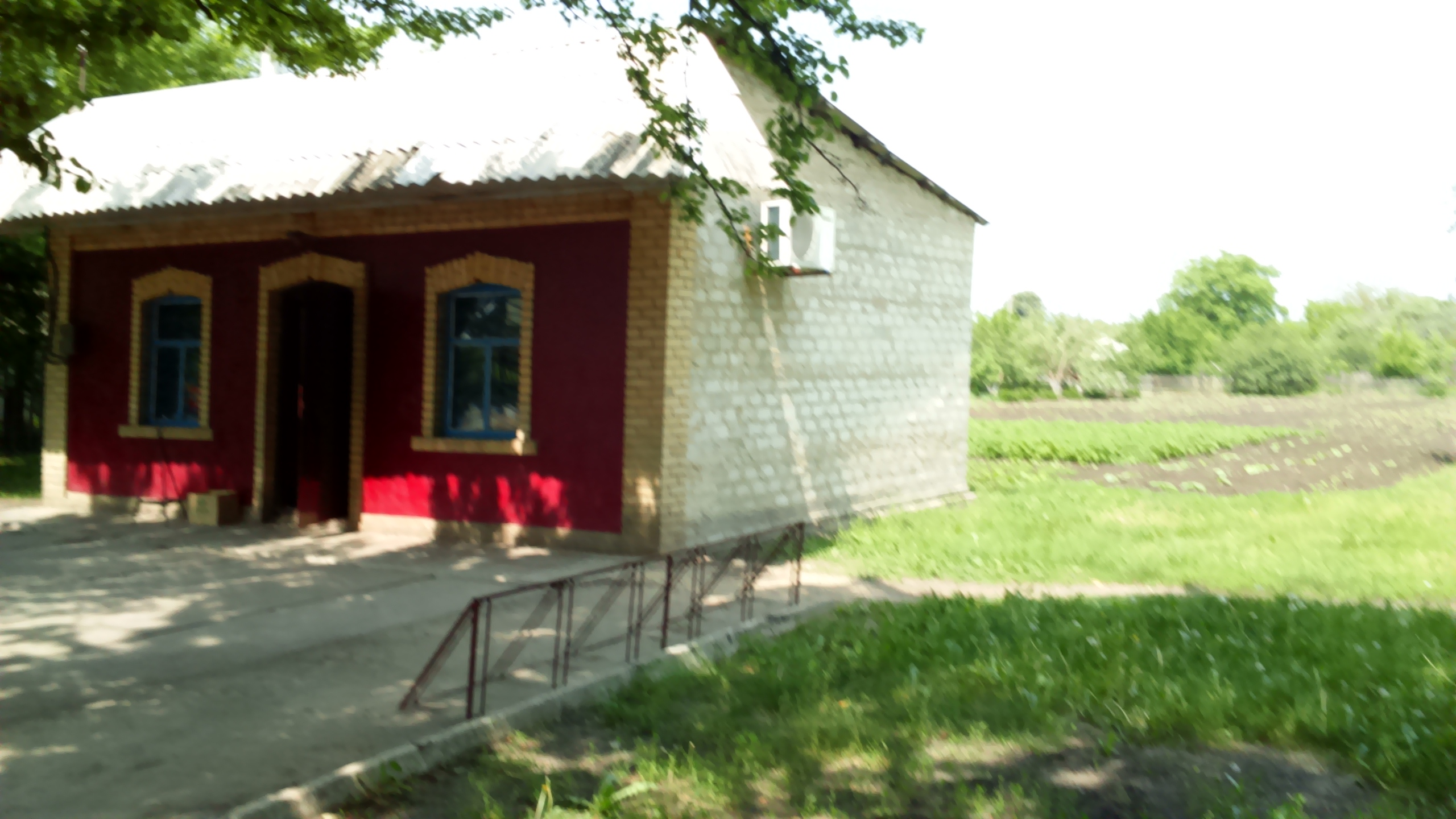 Магазин у селищі Новий Донбасс